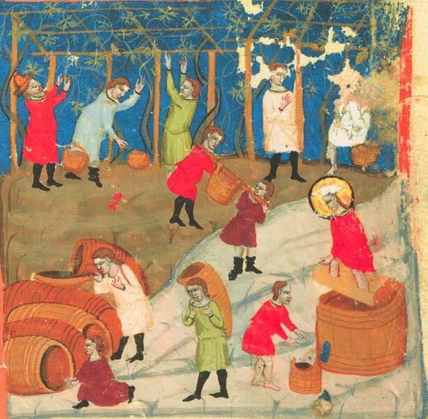 svatý Václav pracuje na vinici